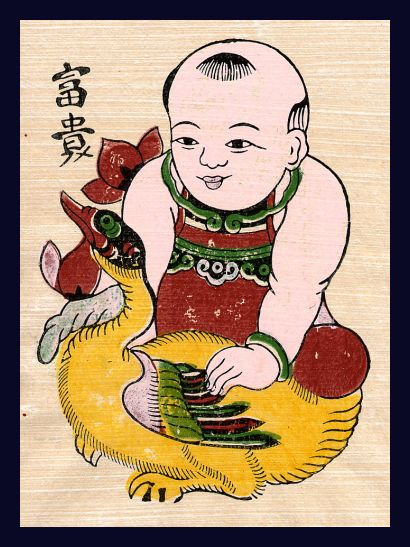 Đông Hồ-style painting.